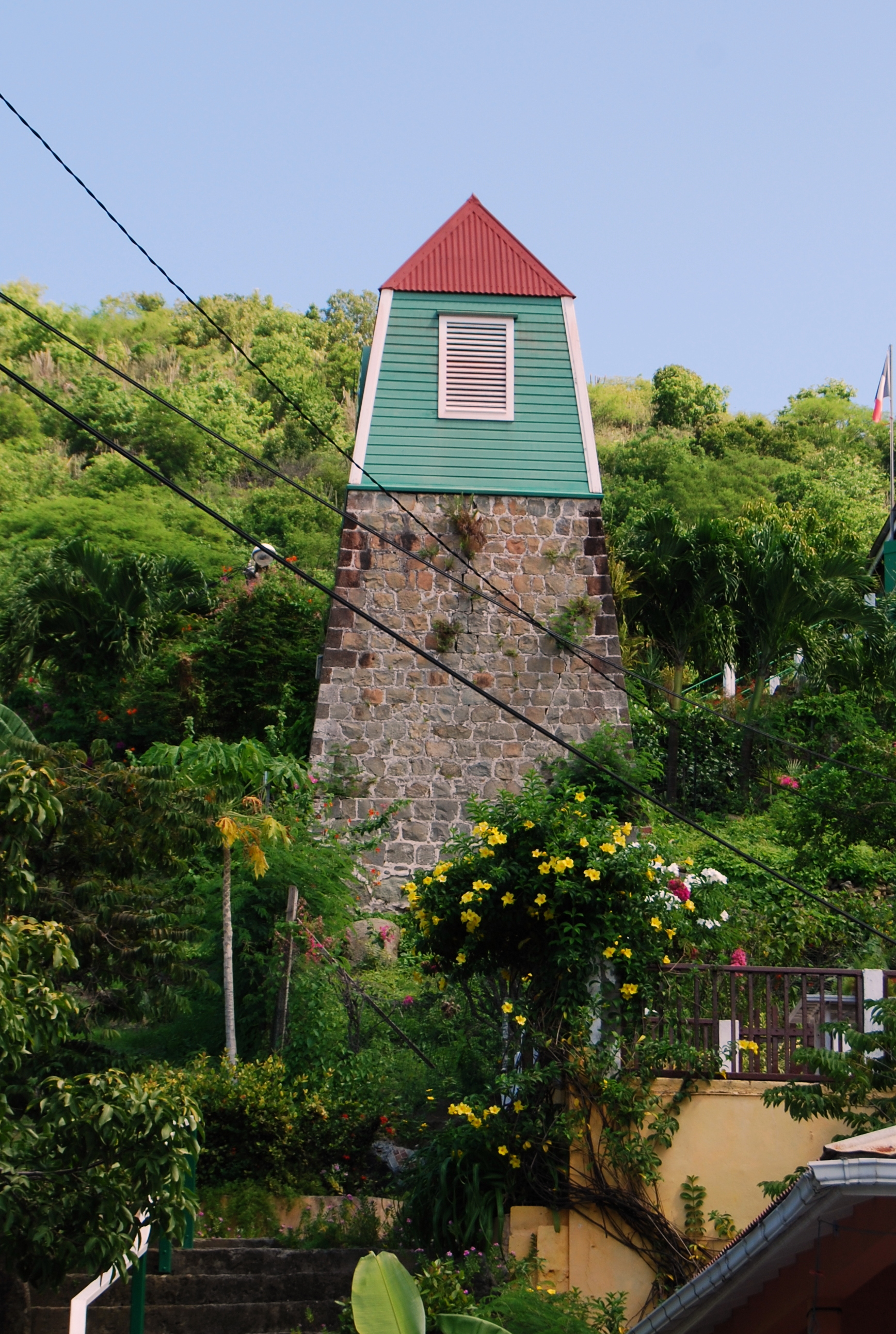 Clocher suédois de Gustavia, Près de la sous-préfectureRue Lubin Prin, Gustavia (inscrit, 1995) .